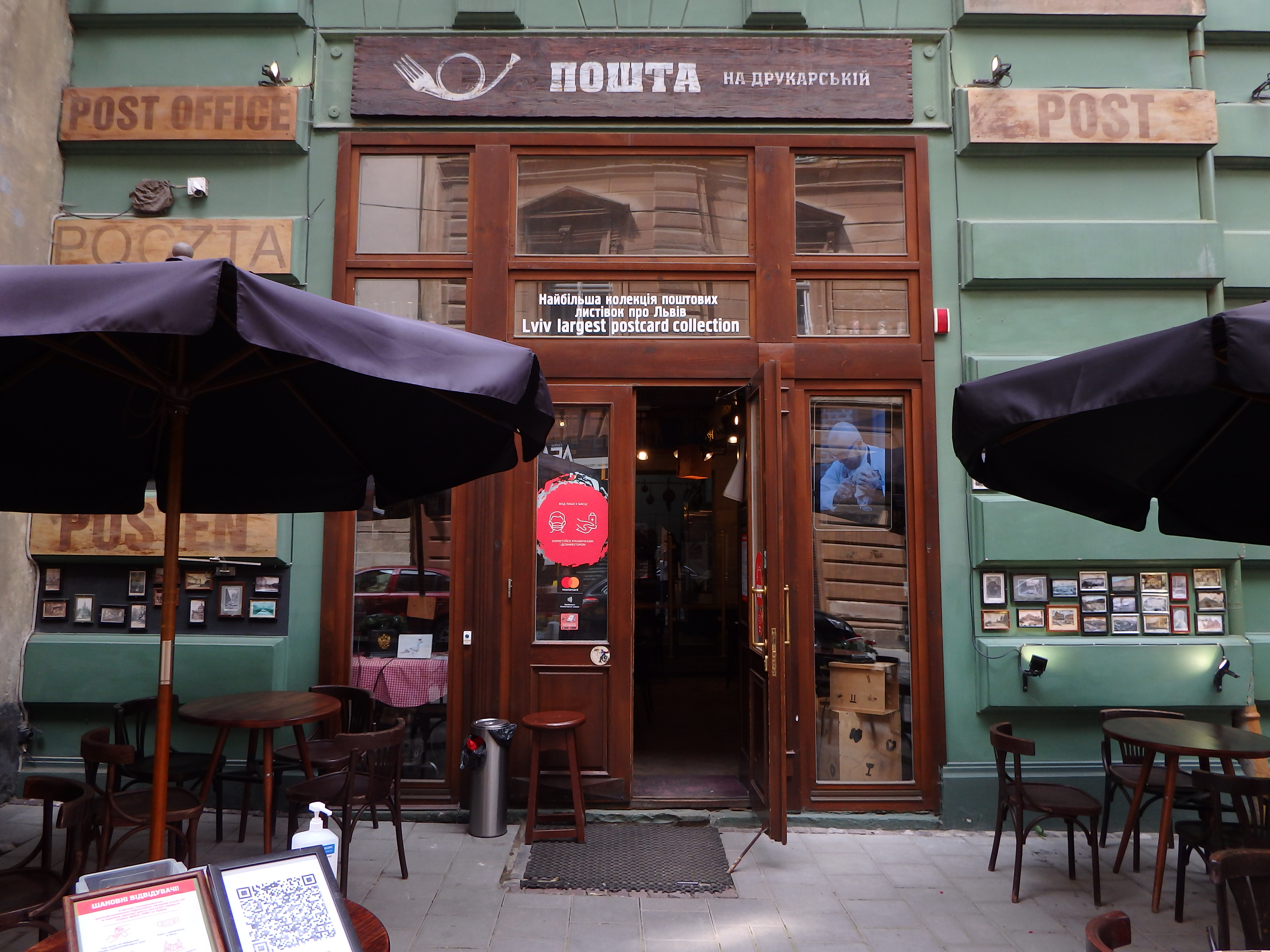 Кафе-пекарня «Пошта на Друкарській»